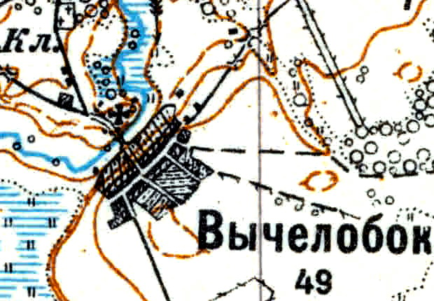 Топографическая карта Ленинградской области, квадрат Vc-29 (Батецкая), деревня Вычелобок